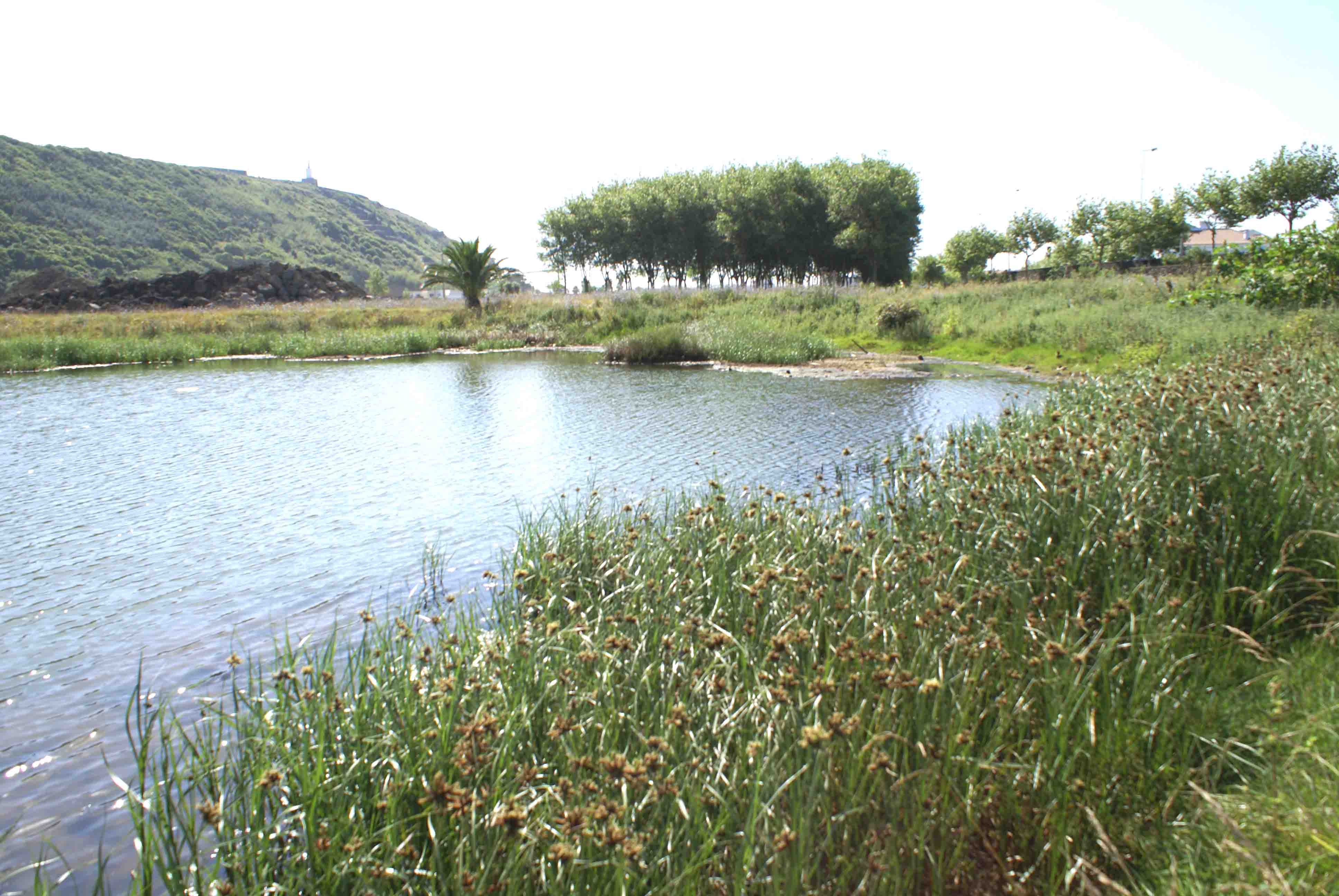 Um dos lagos do Paul da Praia da Vitória, Praia da Vitória, ilha Terceira, Açores, Portugal1.